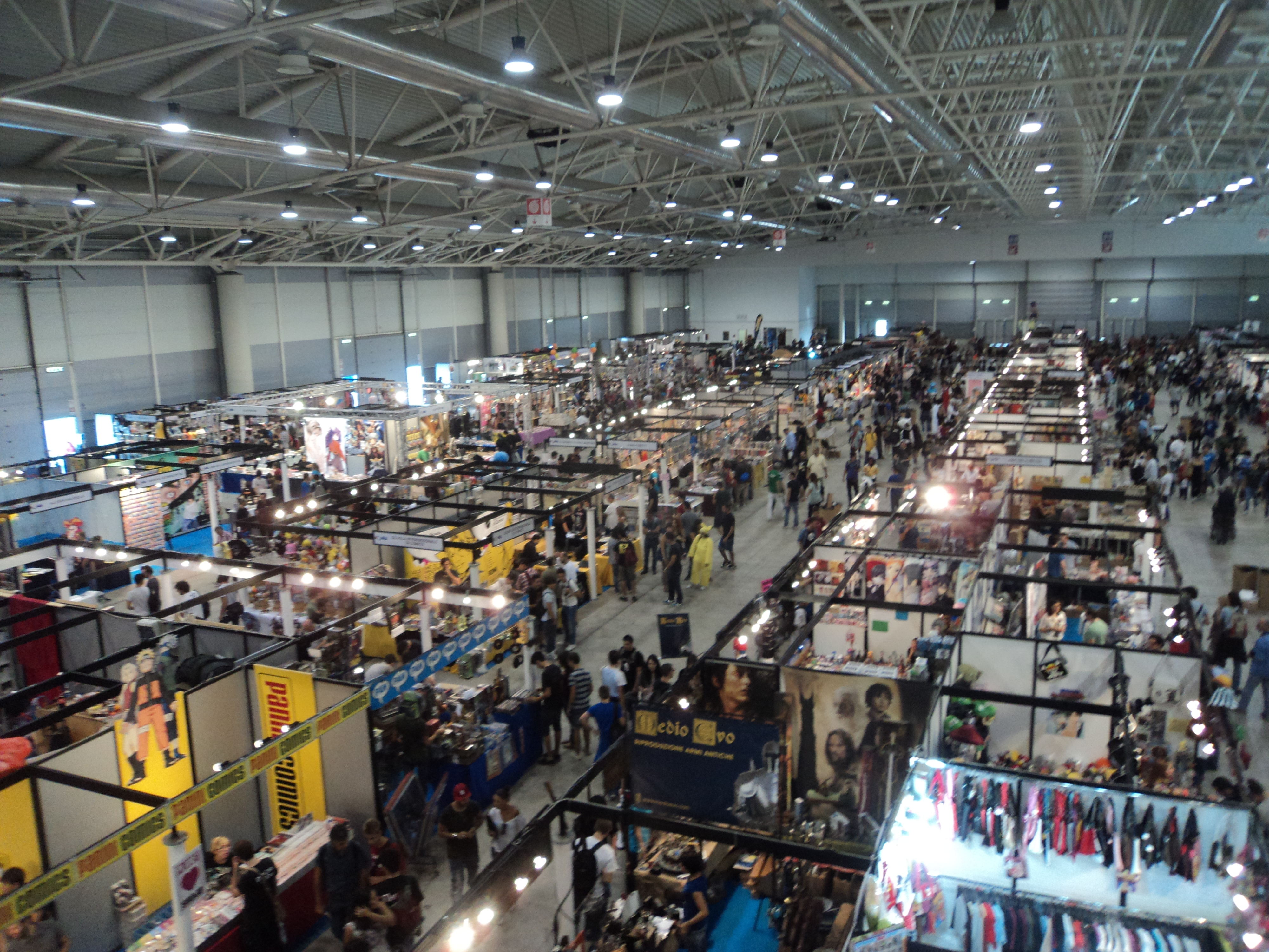 Romics 2012.